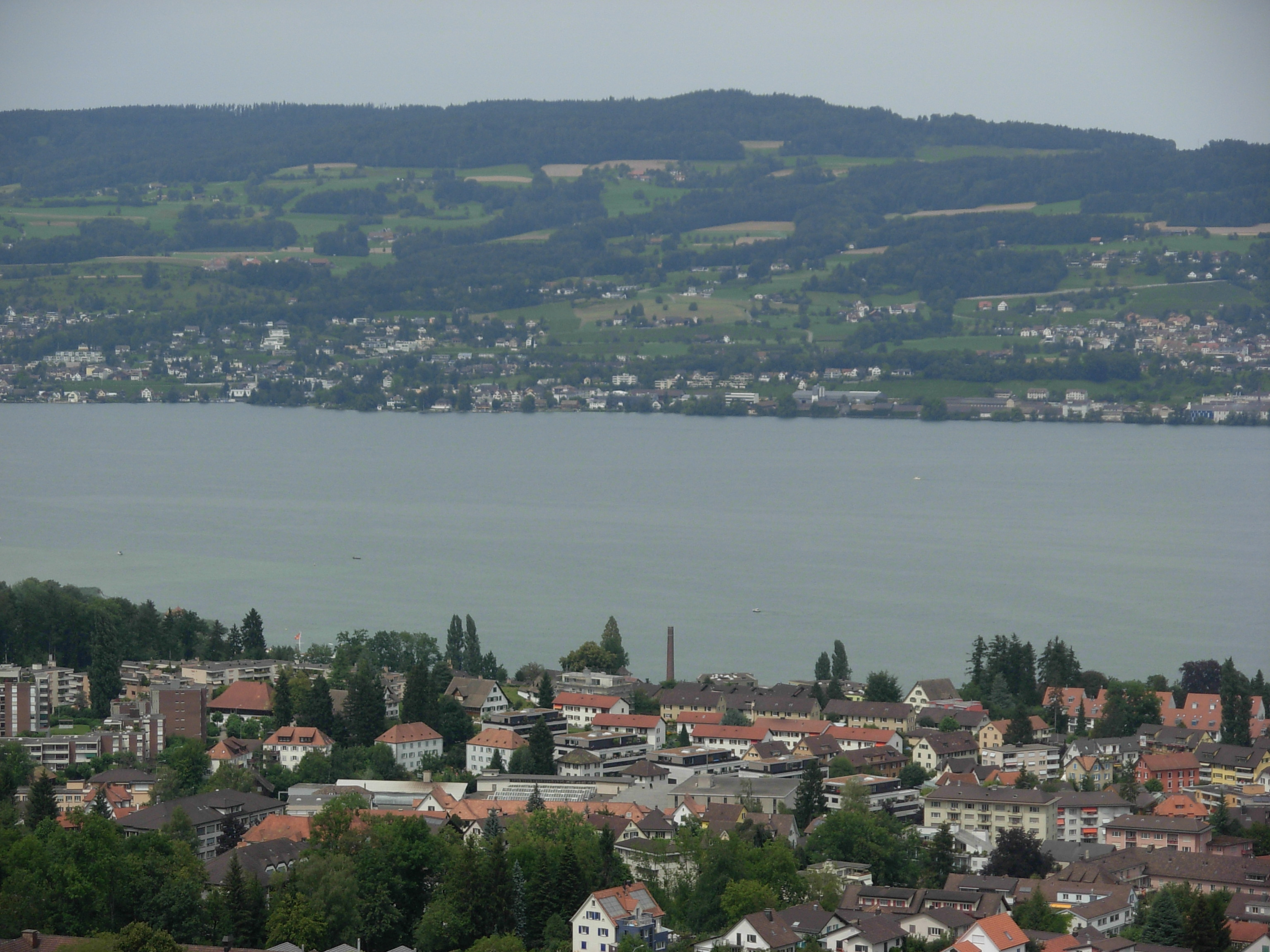 Zürichsjön ligger i den schweiziska kantonen Zürich.